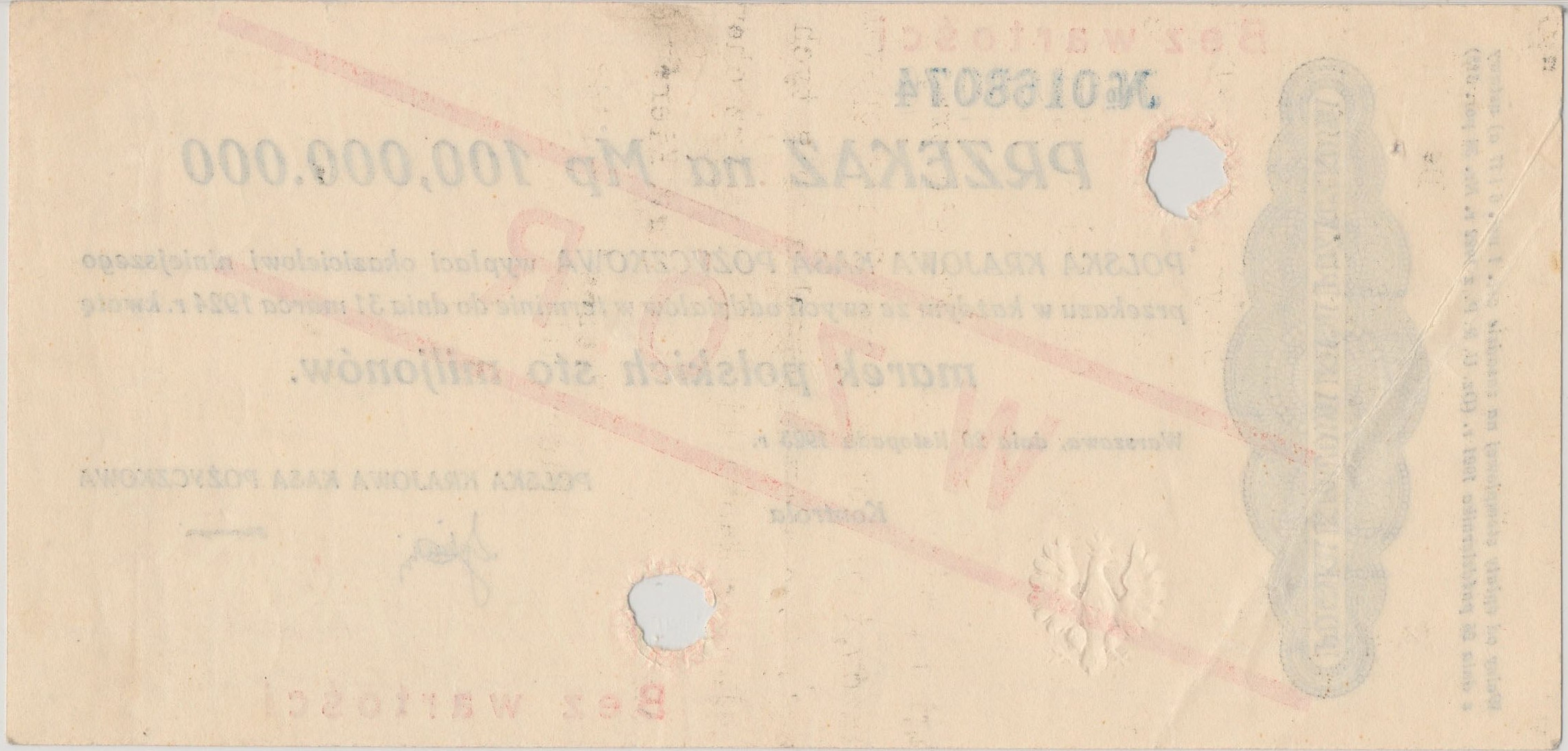 Przekaz 100000000 marek polskich 1924 WZÓR rewers